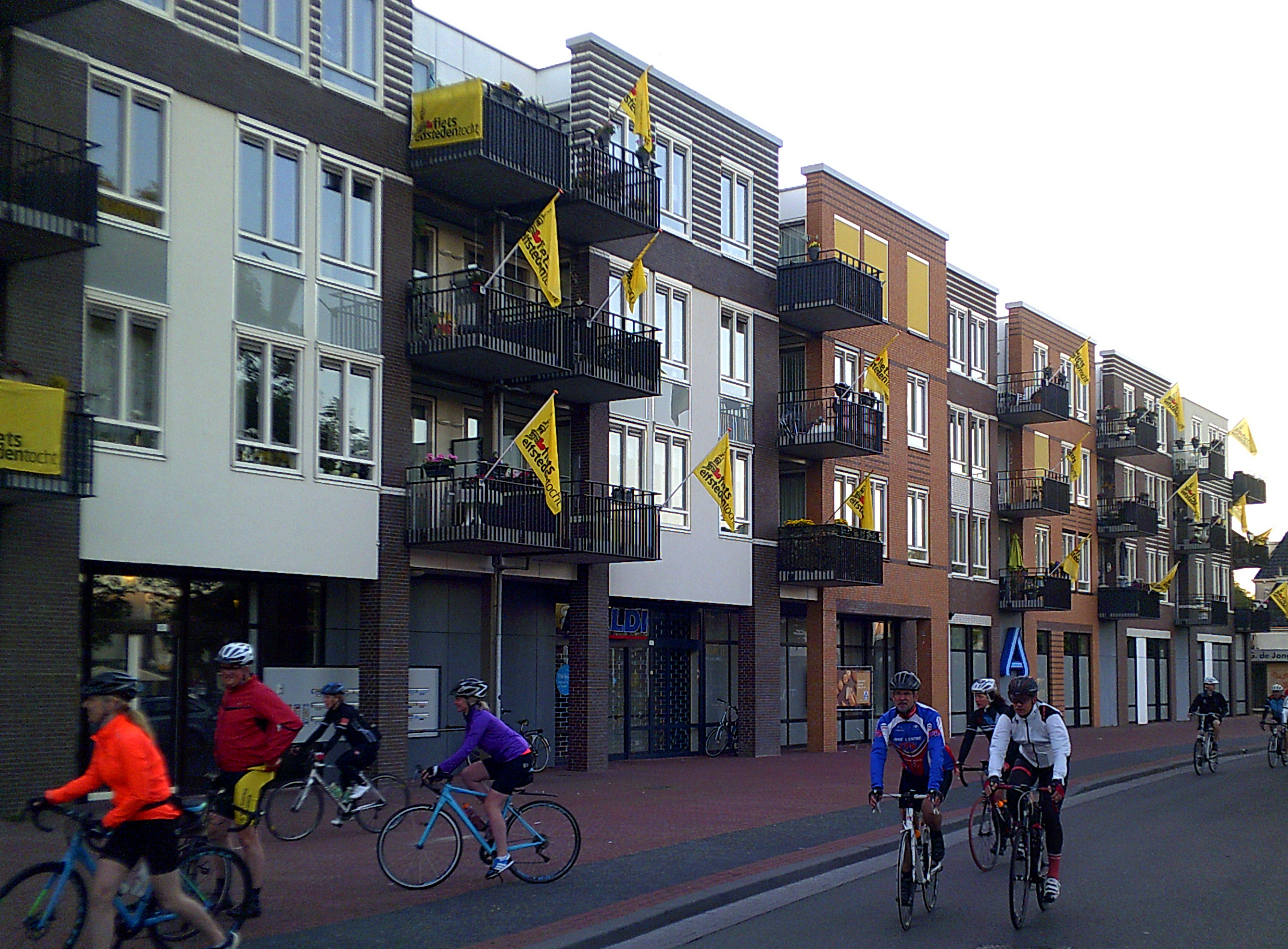 Vlaggen in Bolsward